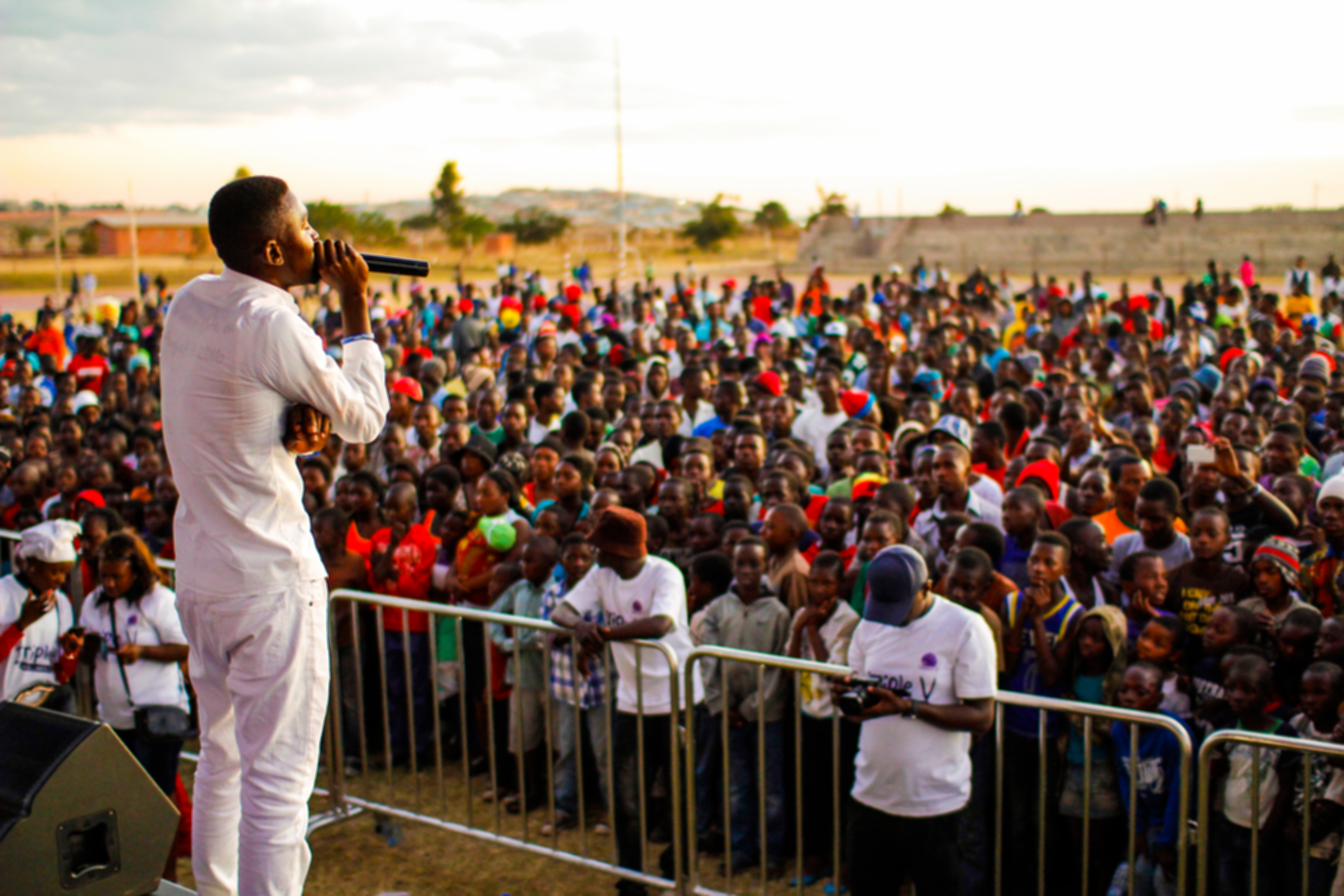 Chi-Chewa: Brian Mumba pa nthawi ya msonkhano wachitatu wa V